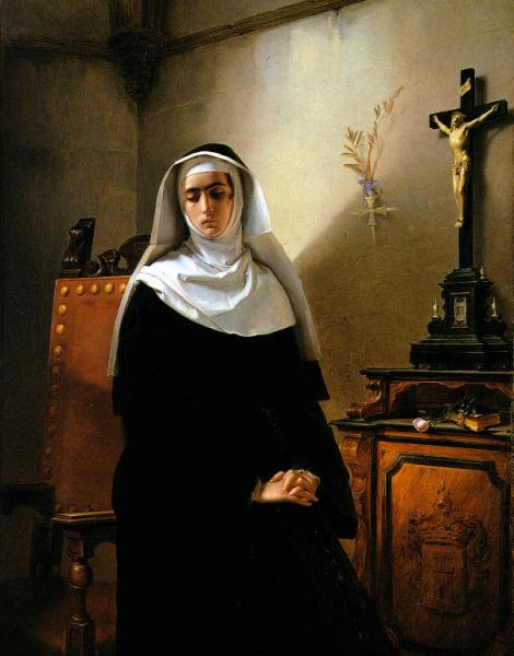 La monaca di Monza, detta "la Signora" - Olio su tela. Musei civici di Pavia.